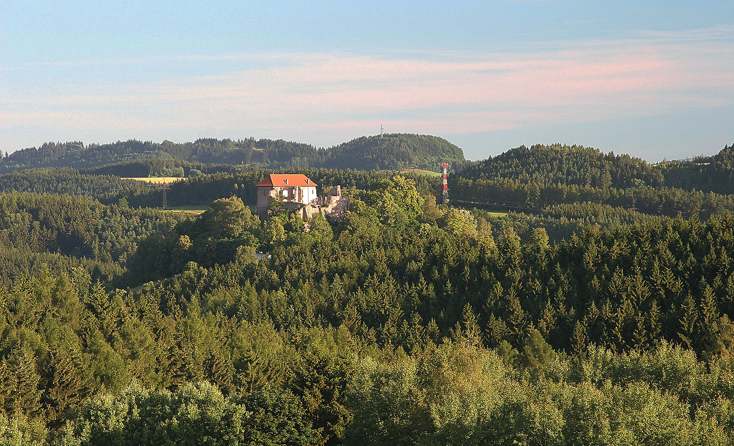 Hrad Pecka, district Jičín, region Hradec Králové, Czech Republic autor: Prazak date: 17. 7. 2006